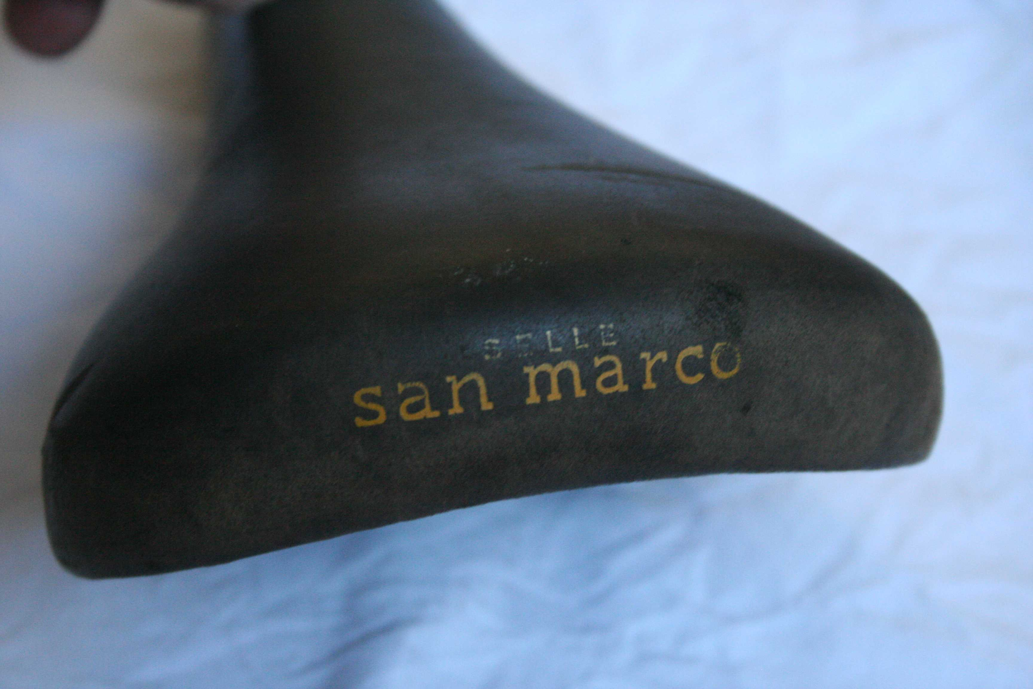 Der Selle San Marco GI 311 ist ein mit Leder überzogner Rennradsattel